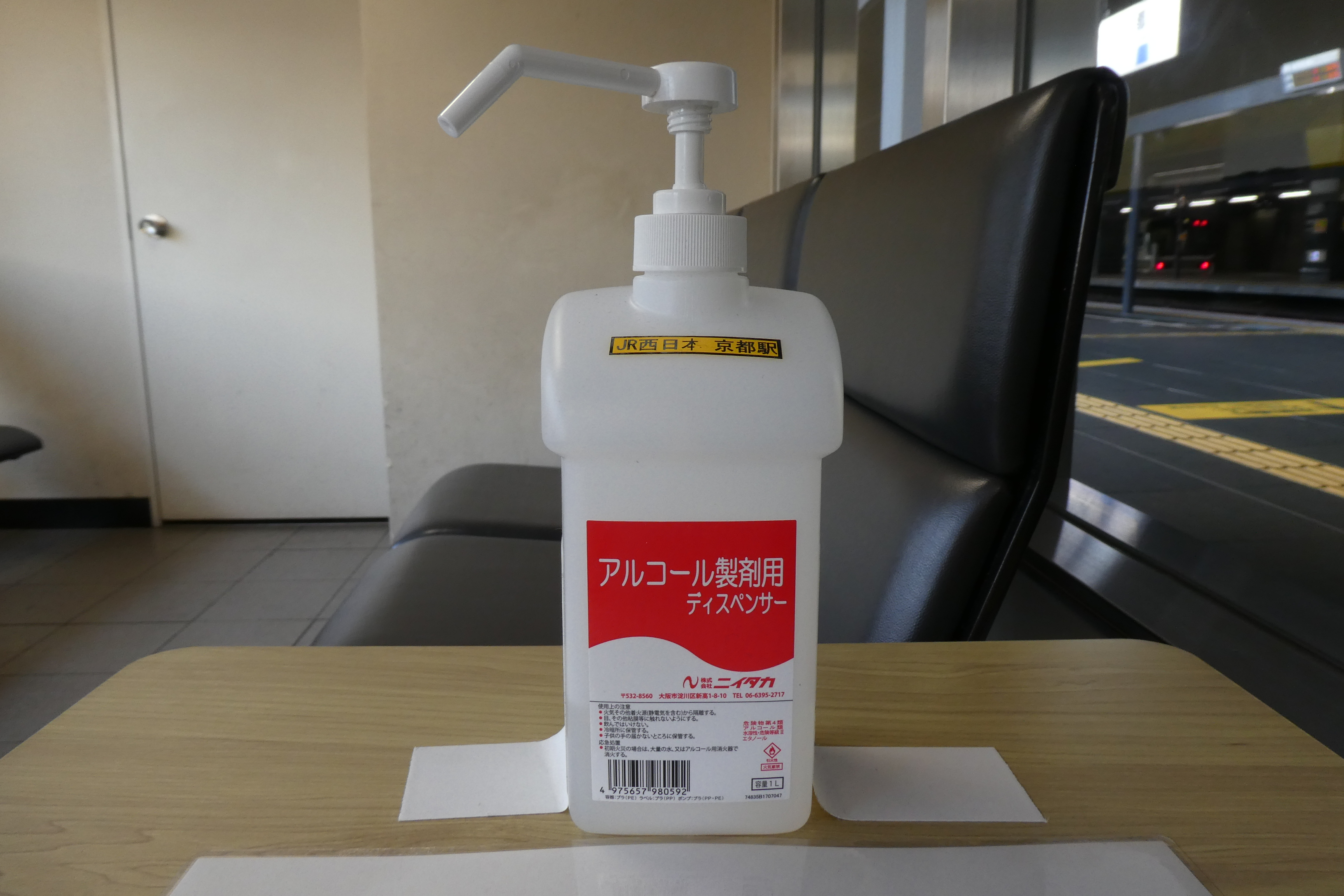 消毒用アルコール。株式会社ニイタカの商品。